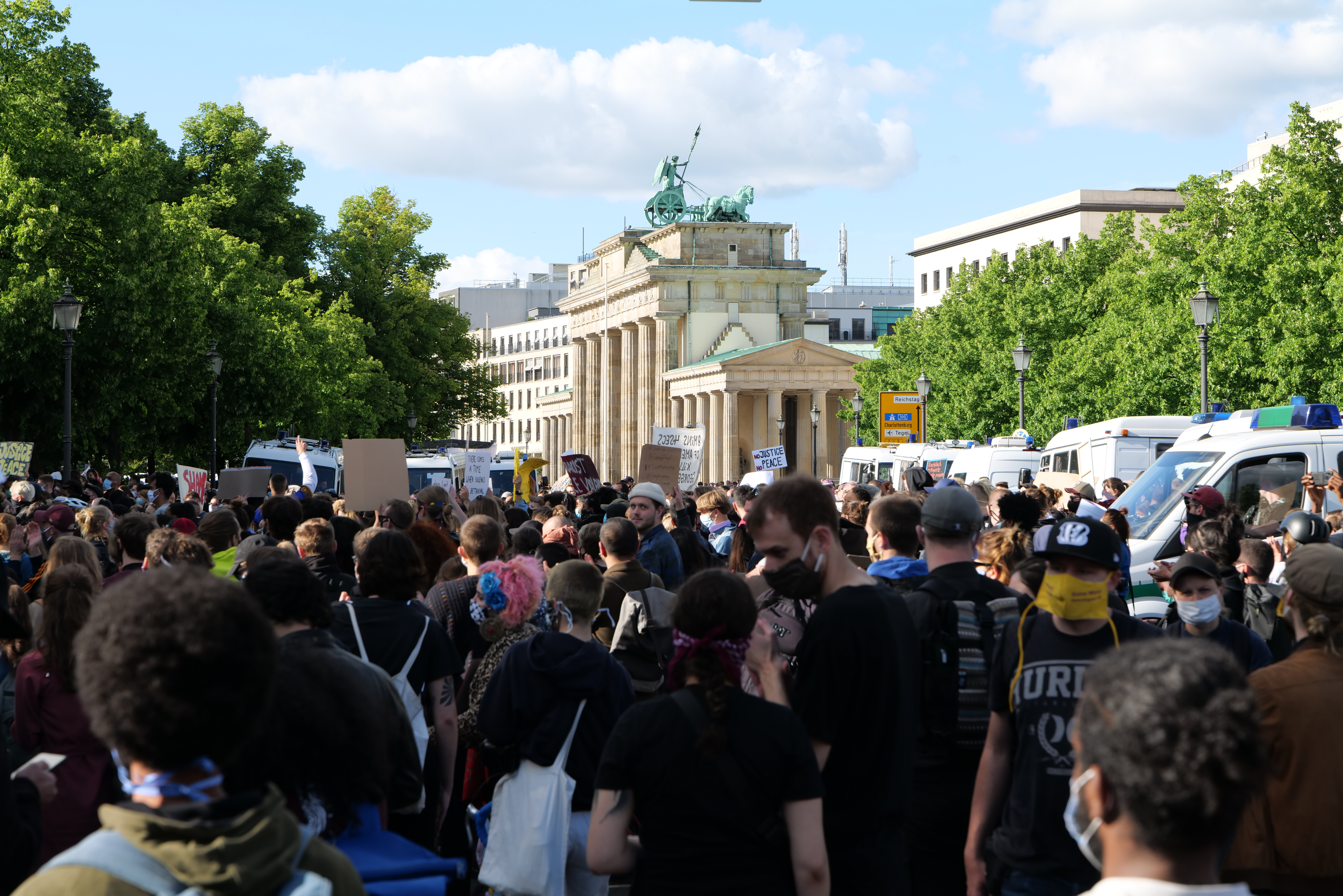 Kundgebung gegen Rassismus und Polizeigewalt an der Botschaft der USA in Berlin nach dem Mord an George Floyd durch einen Polizisten in den USA am 30. Mai 2020.